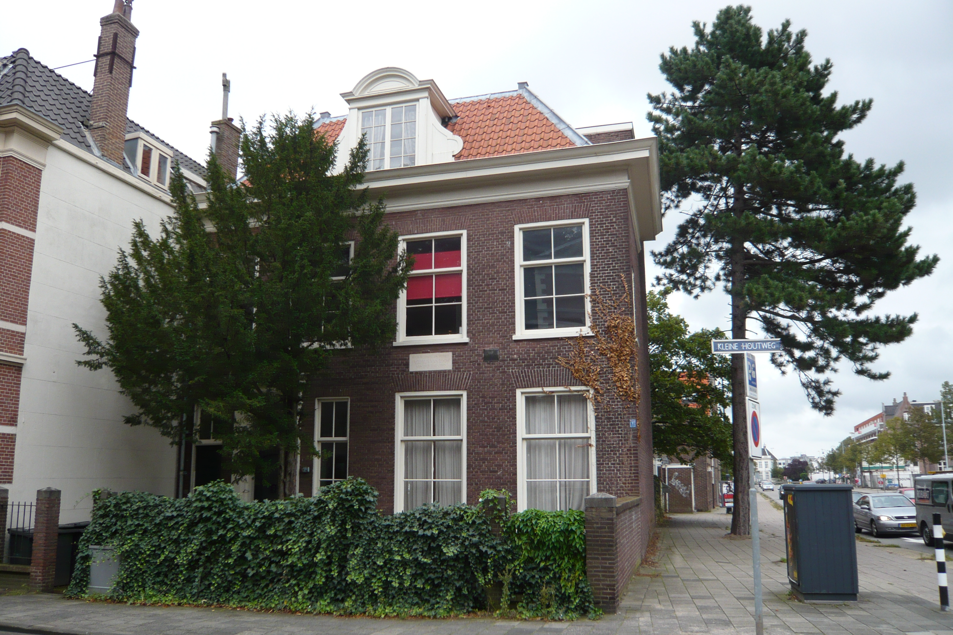 Vormalige huis van de schrijver Jacobus van Looy en gedurende een aantal jaren een museum ter ere van hem. Kleine Houtweg 103, Haarlem.